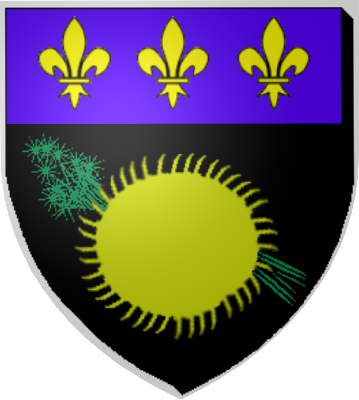 Escudo de Pointe-à-Pitre, extendido como símbolo no oficial de toda la isla